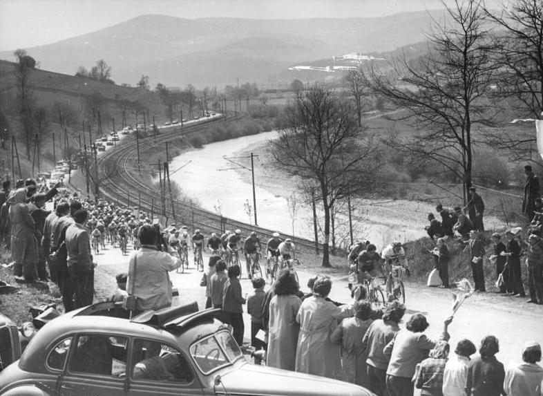 Friedensfahrt, Fahrerfeld, Zuschauer Zentralbild Wendorf 9.5.1960 - XIII. Friedensfahrt 1960 - 4. Etappe. UBz: Zehn Kilometer nach dem Start liegt das Feld noch dicht zusammen.